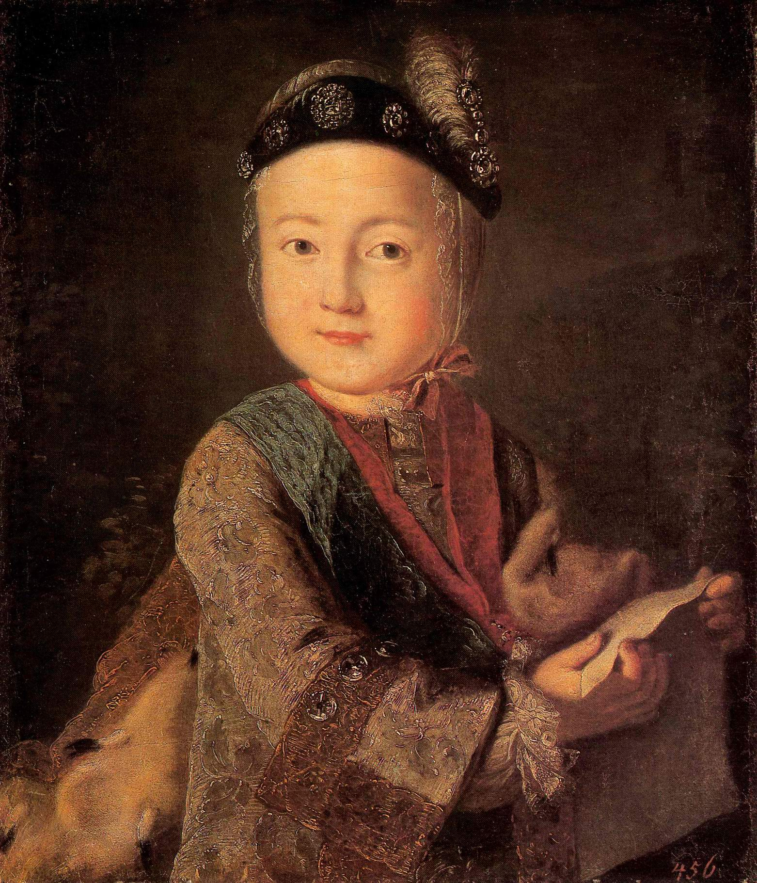 Портрет Павла Петровича в детстве. Неизвестный художник. 2-я половина 18 века. Кострома.